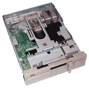 5.25" floppy disk drive